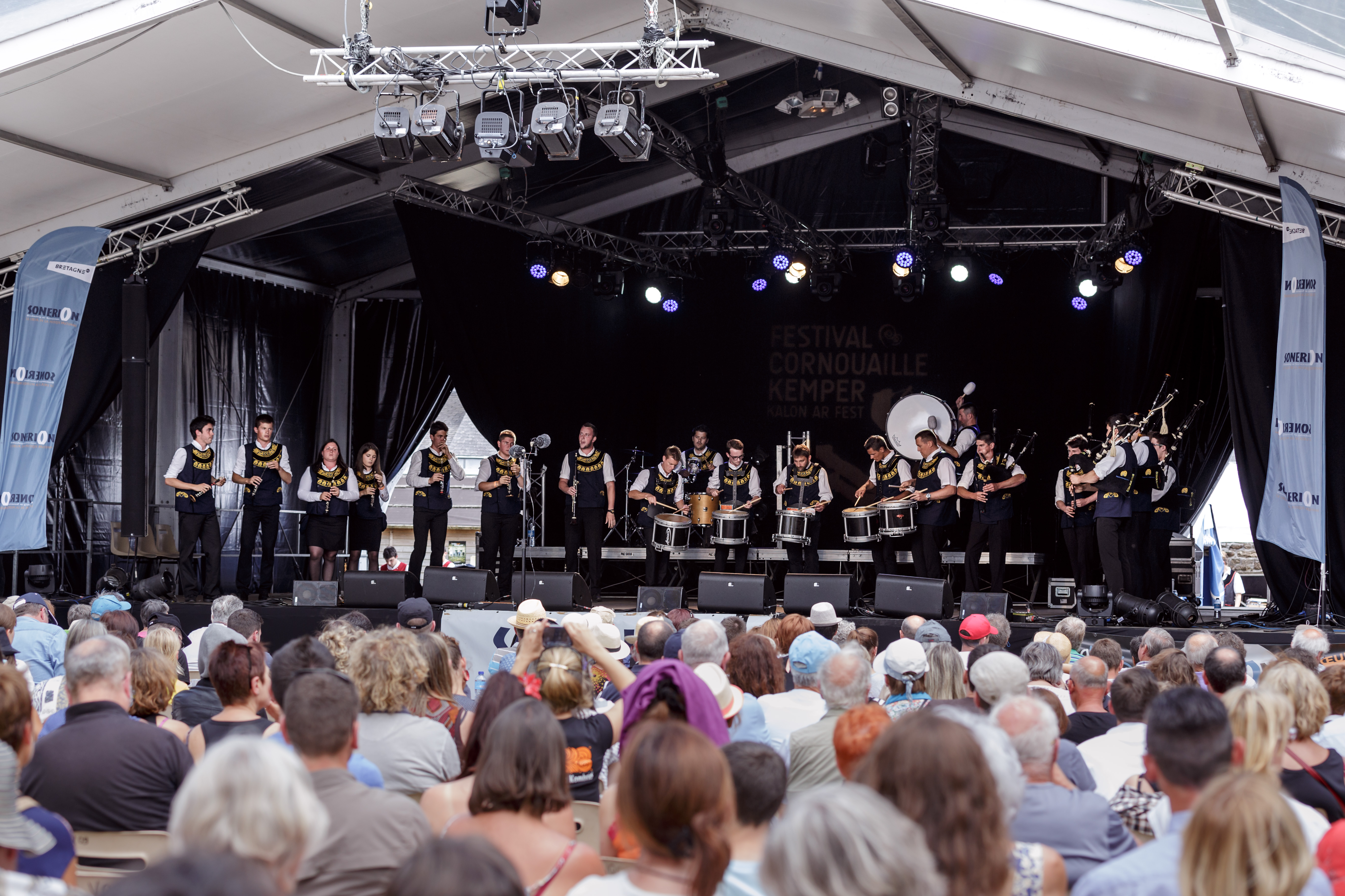 Championnat national des bagadoù de 3e catégorie au Festival de Cornouaille à Quimper le 23 juillet 2016.